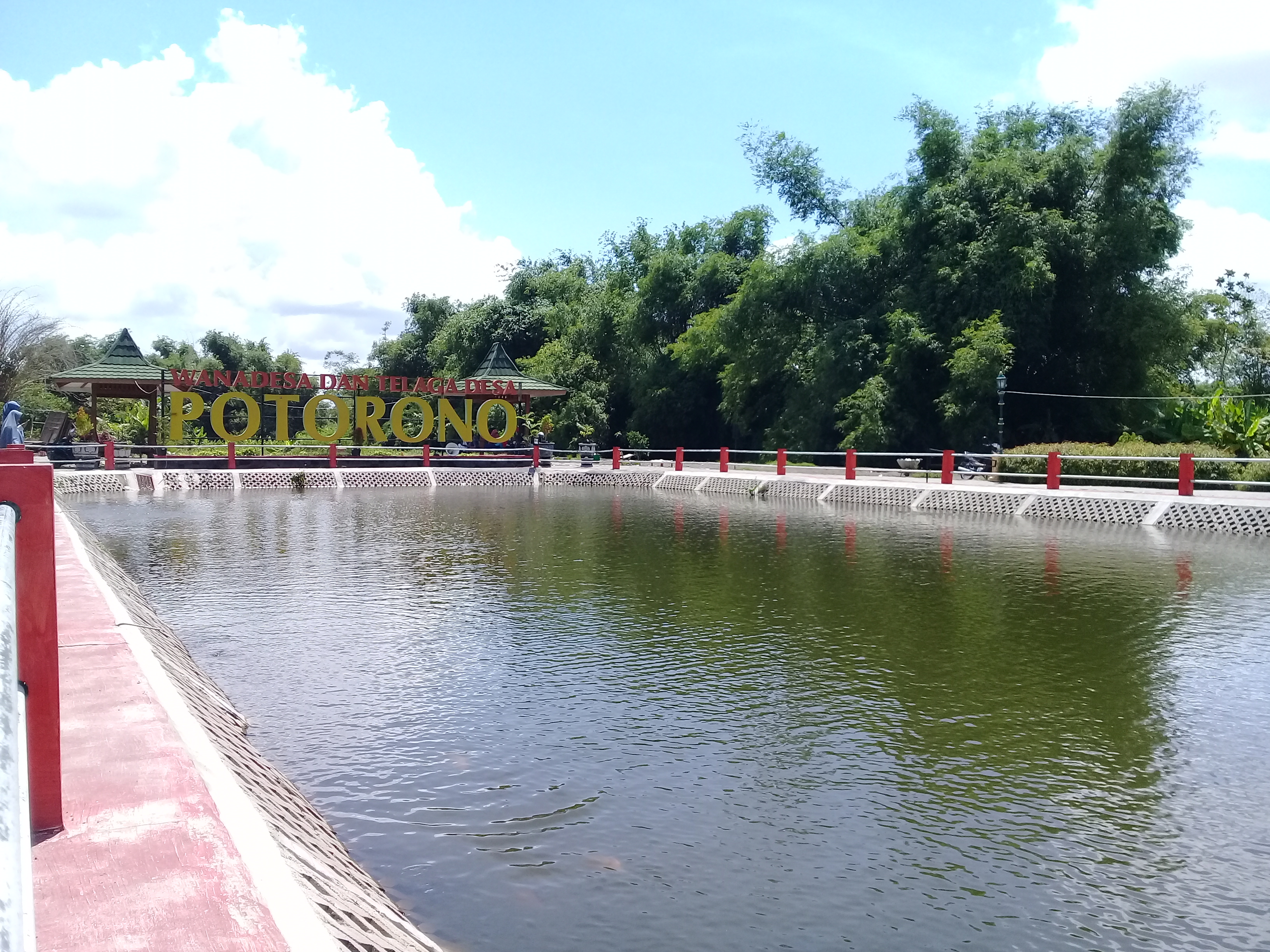 wisata alternatif baru di potorono, banguntapan, bantul, yogyakarta